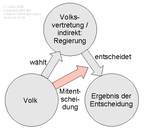 Schaubild Throughput-Legitimation Autor: C.Löser Erstellt mit: de: Draw